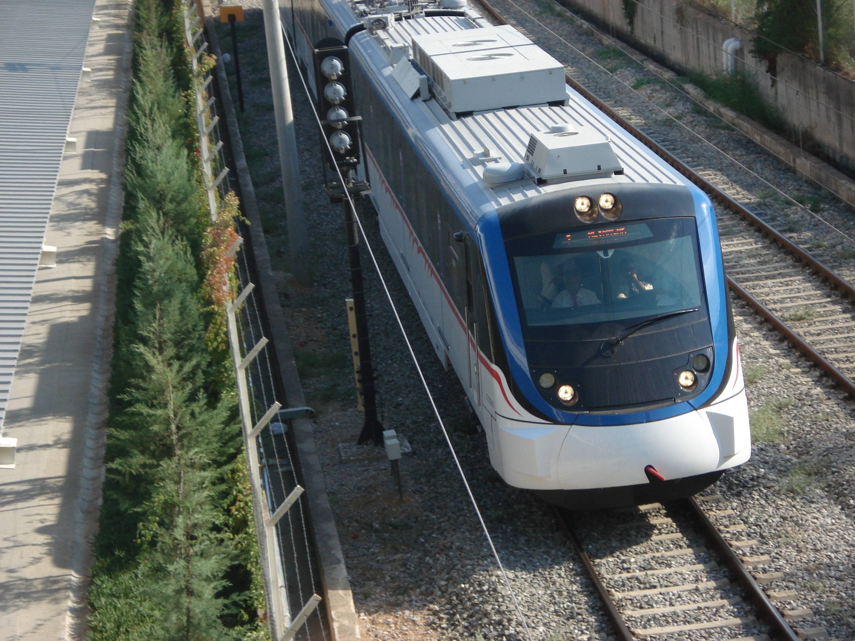 S-Bahn Izmir (IZBAN - Izmir banliyösü) am Flughafen Adnan Menderes